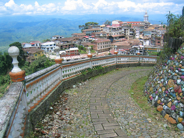 Vista del centro de Zaruma